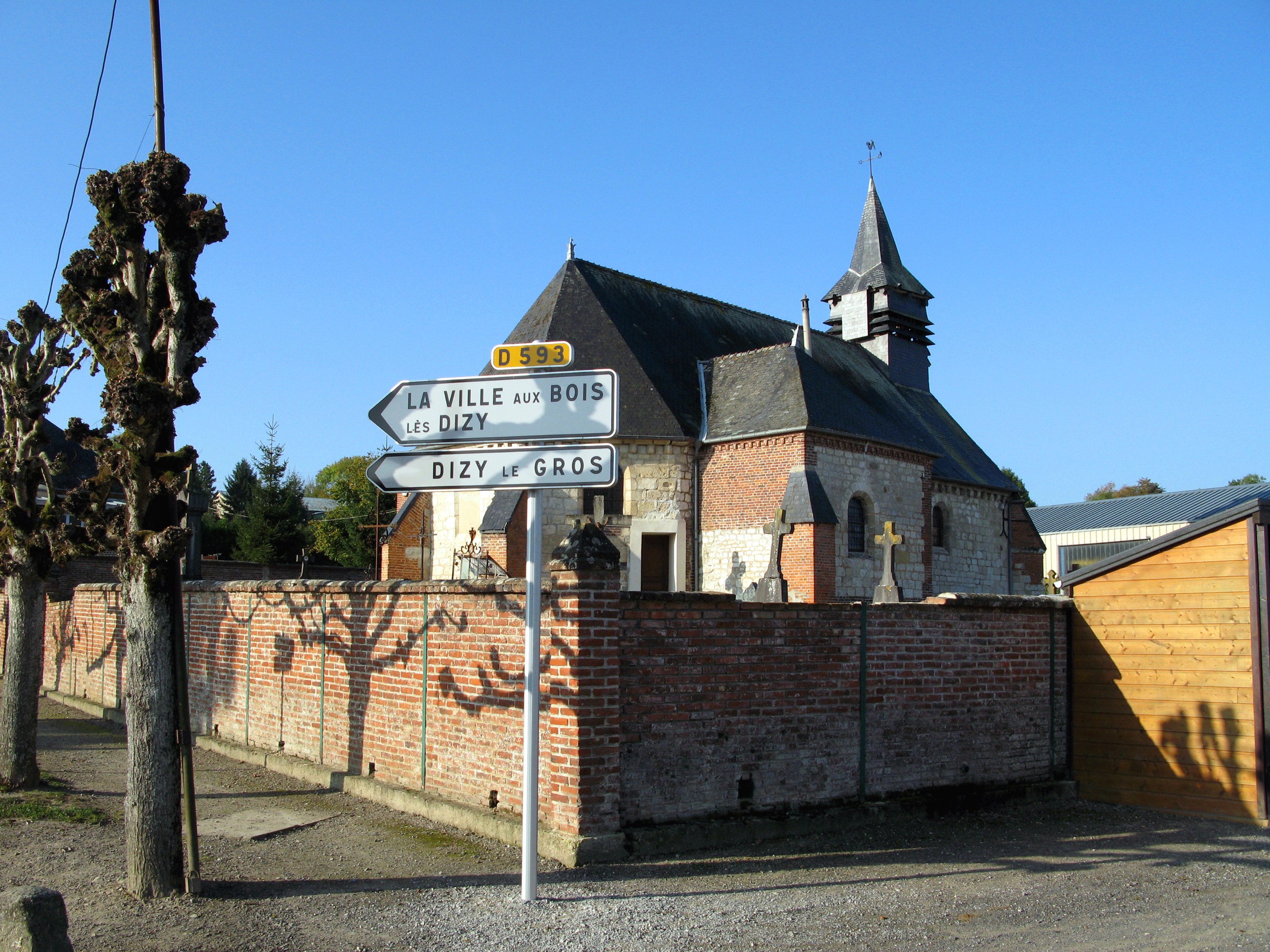 Lislet (Aisne, France) - L'église. Si les panneaux routiers sont dans le "champ visuel" et peuvent gêner la vue du chevet de l'édifice, c'est voulu : cette photo a été prise non dans un but "architectural", mais dans celui de localiser géographiquement le village et l'église. Il en est de même pour les arbres à gauche. Je voulais montrer que l'église et son cimetière sont à l'angle de 2 rues, et clos par un long mur de brique.